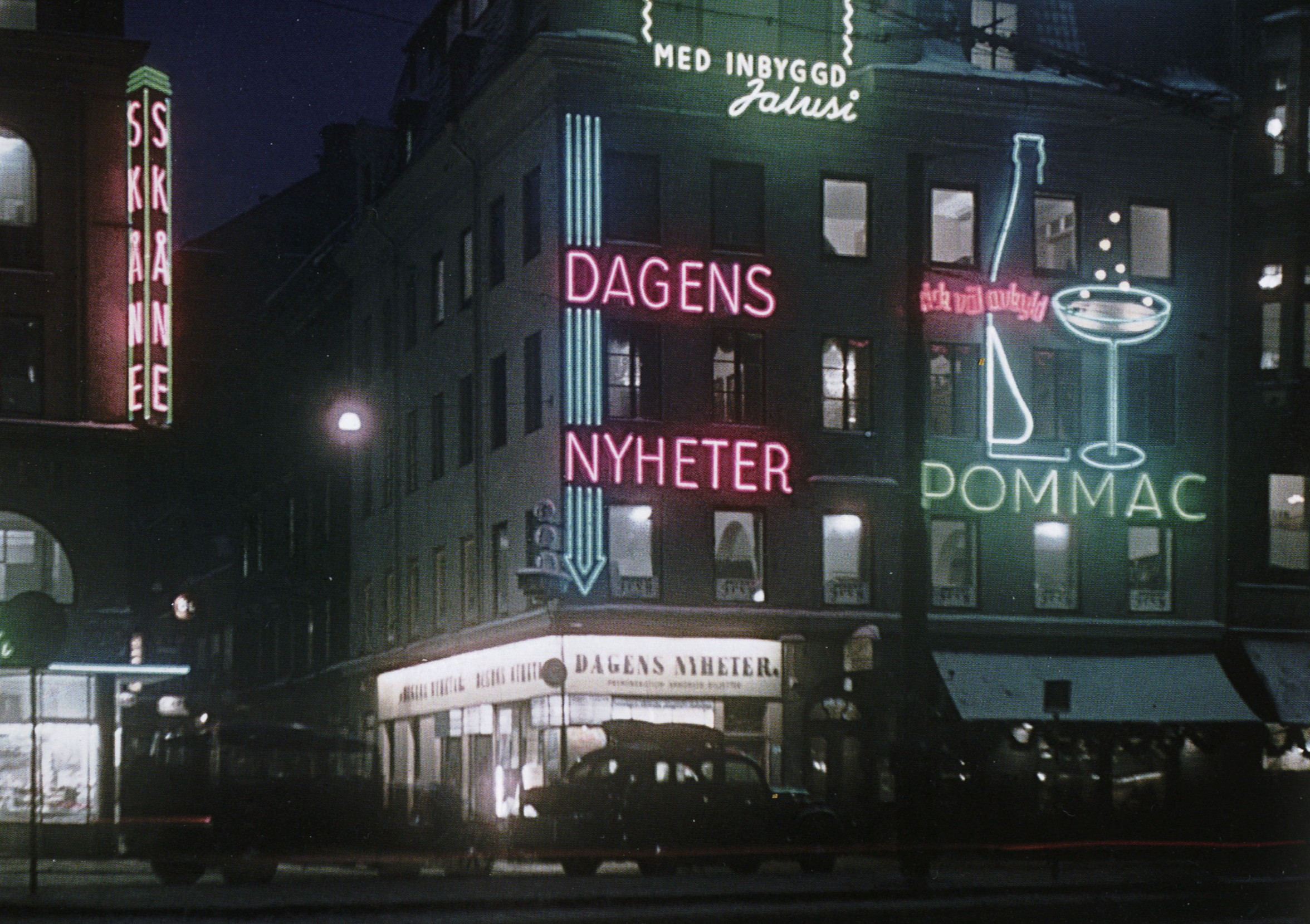 Stureplan ljusskyltar 1943, "Dagens Nyheter", "Pommac"